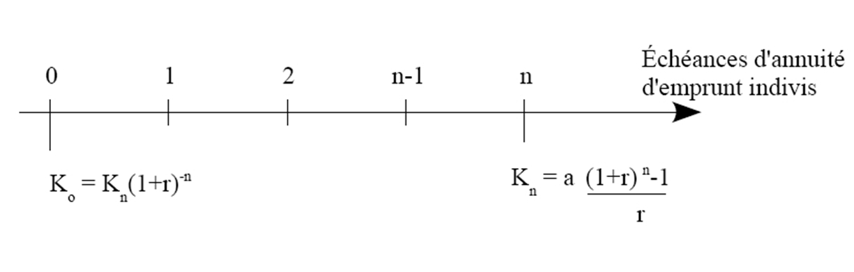 annuité constante d'emprunt indivi